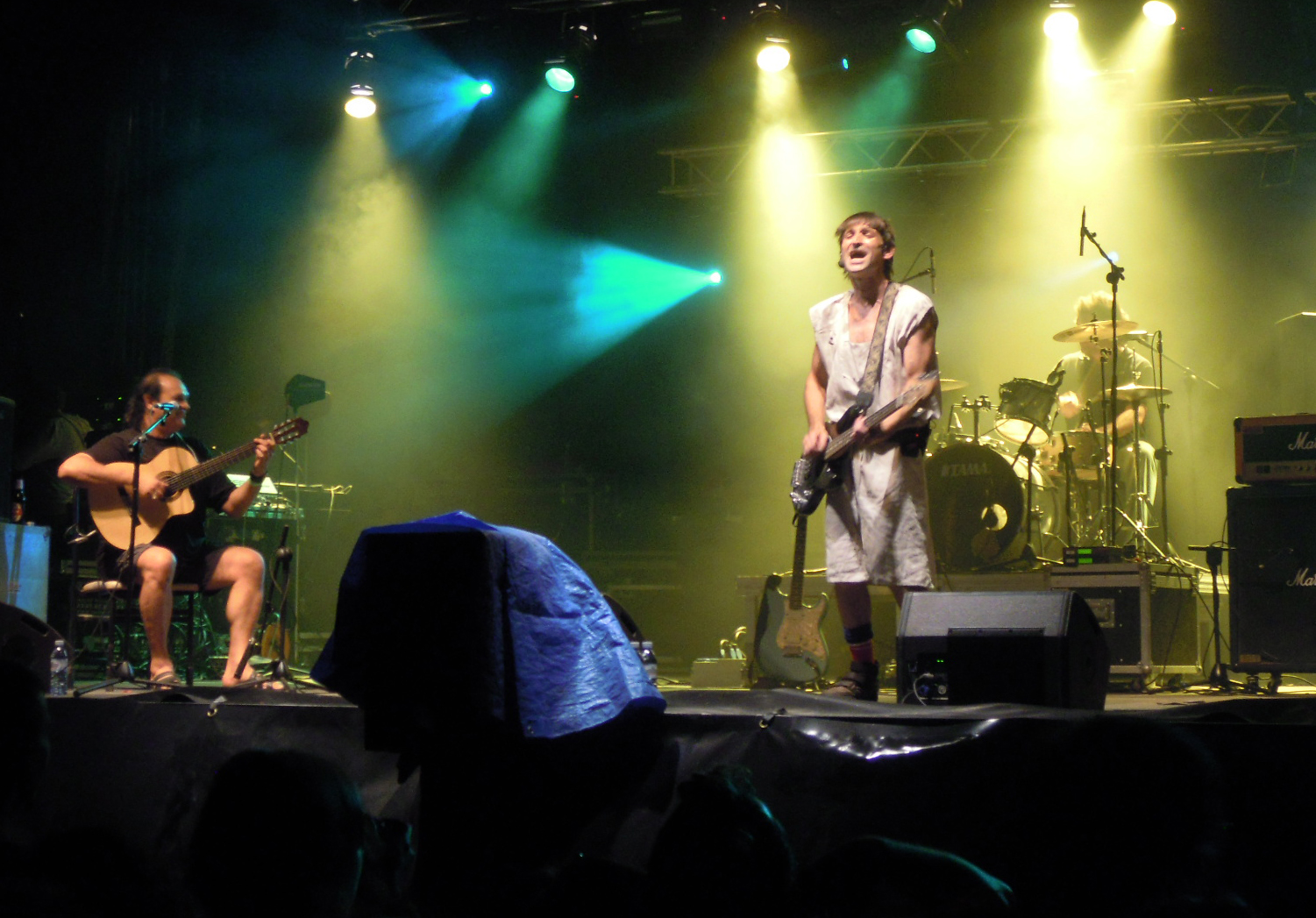 Albert Pla con Diego Cortés e Tino di Geraldo en concerto en Bueu, no festival SonRías Baixas, 10º Troula na Banda